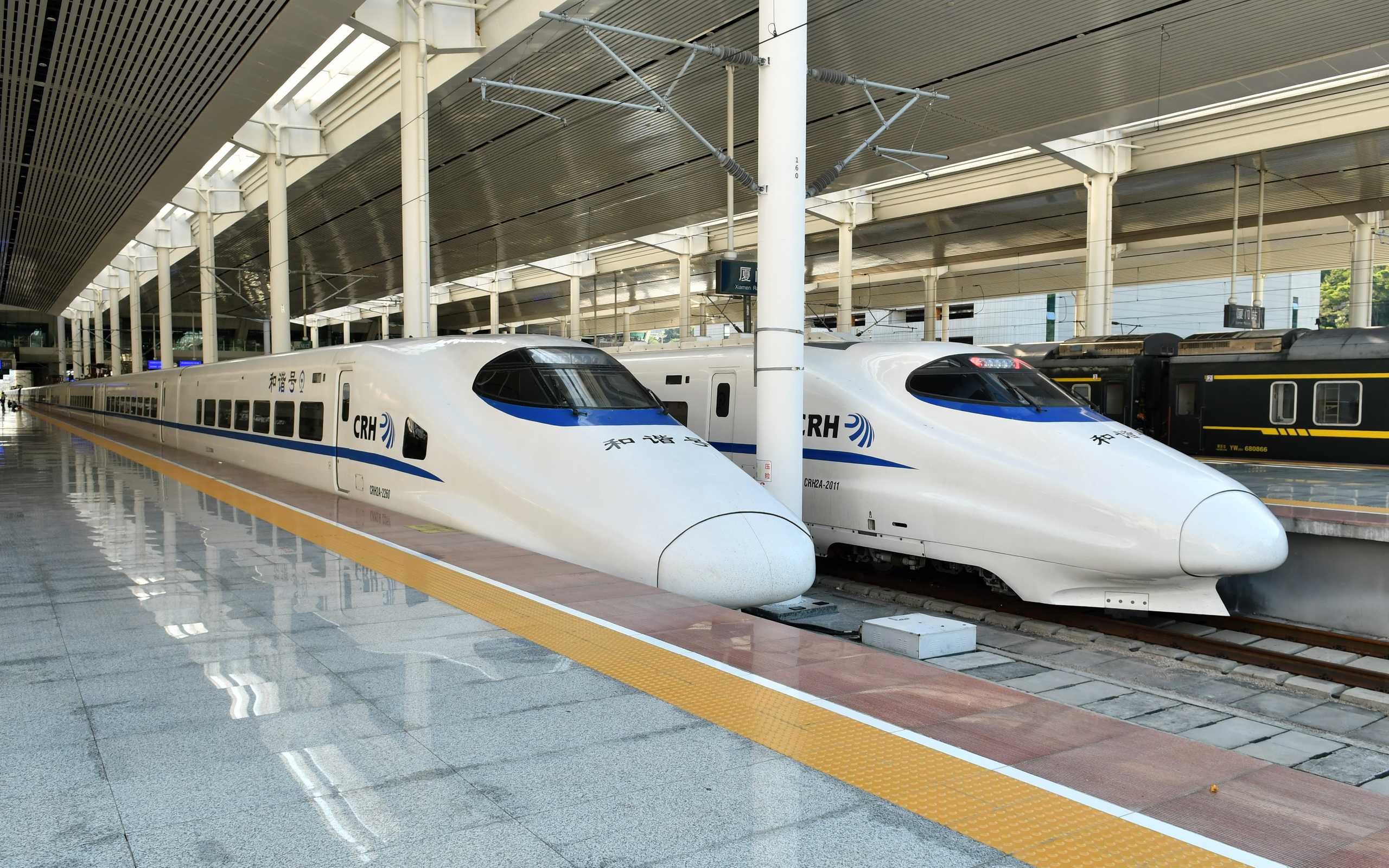 CRH2A动车组在厦门站